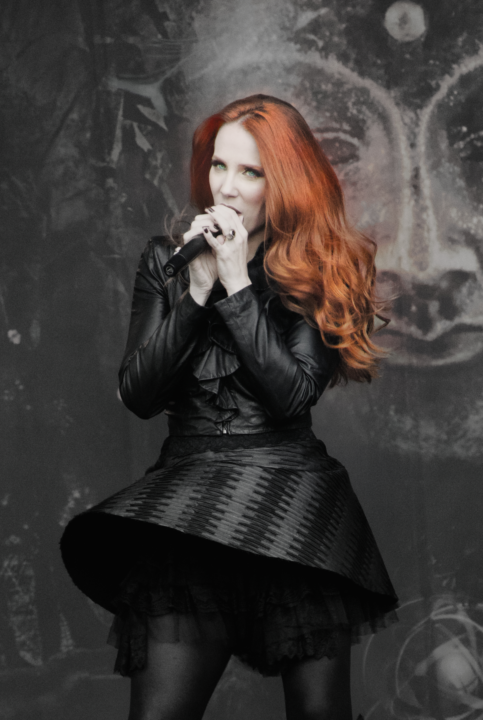 Simone Simons - Epica - Parkpop 2014